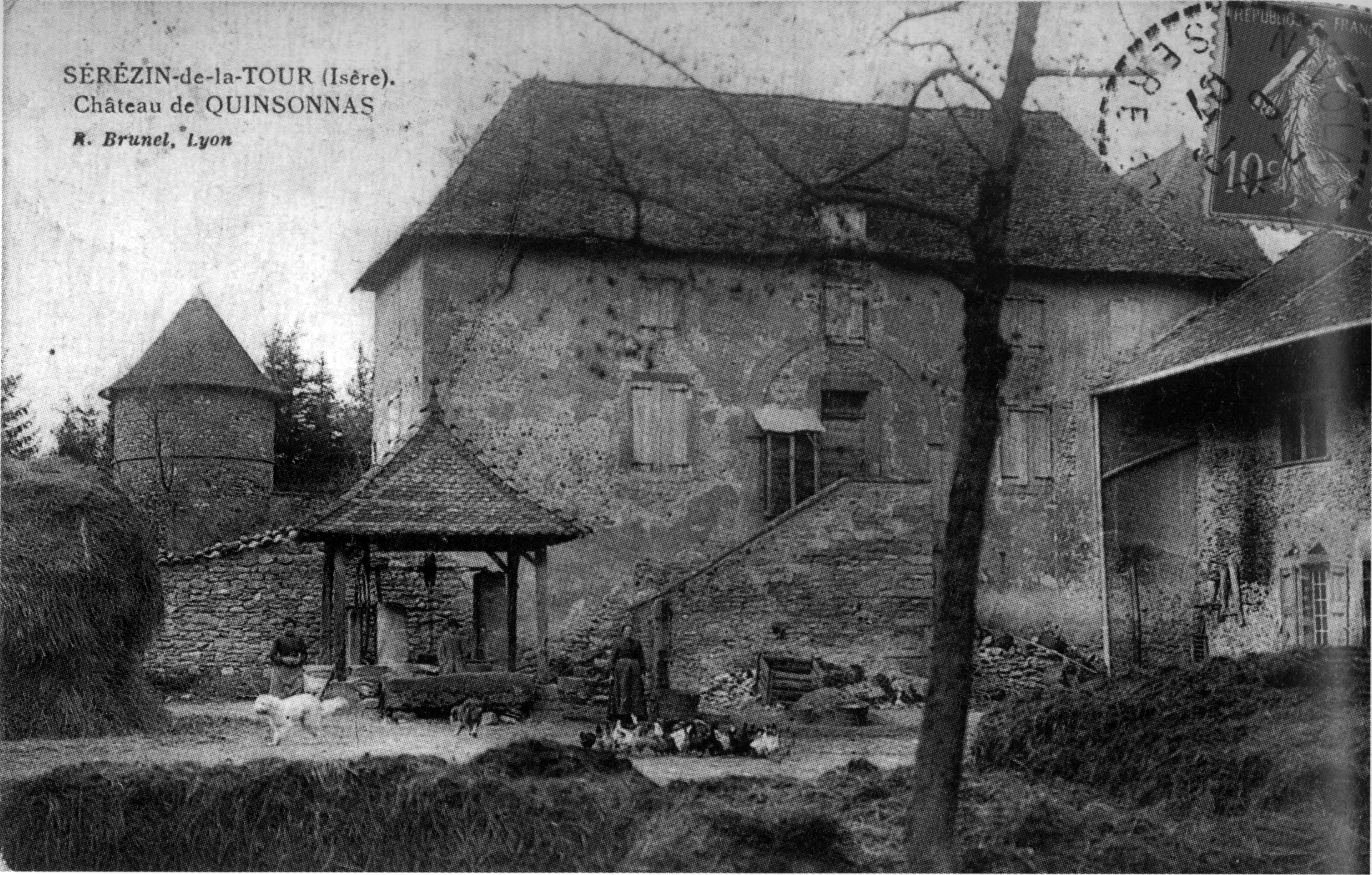 Sérézin-de-la-Tour, chateau de Quinsonnas, 1907